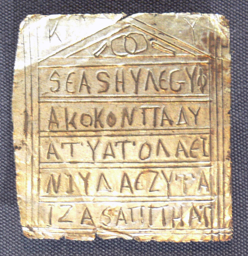 Magische Inschrift